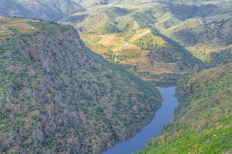 Vista del Duero desde el mirador de la Ermita de Nuestra Señora del Castillo, en Pereña de la Ribera, provincia de Salamanca, Castilla y León, España.